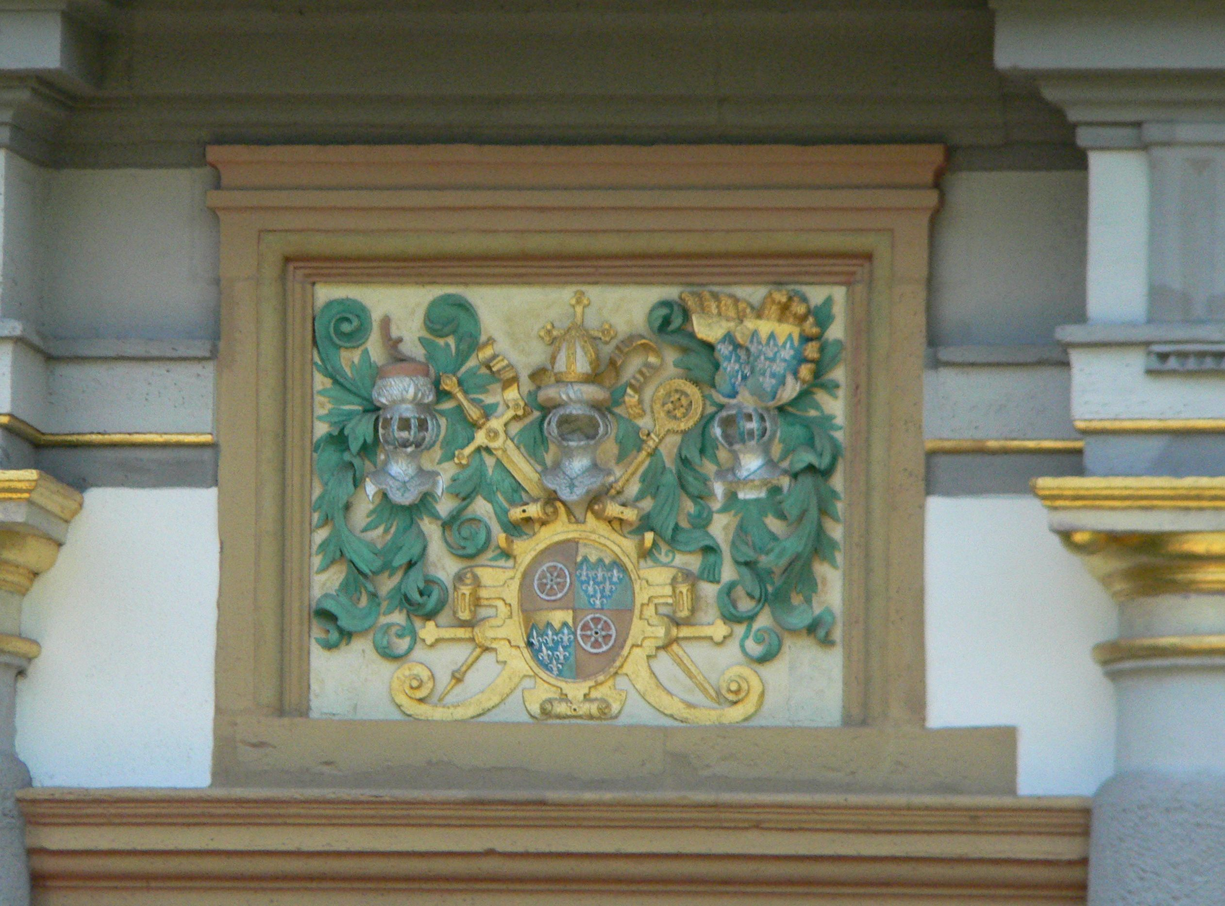 Wappen Wolfgang von Dalbergs (* 1538, † 1601) über dem Eingang des Höchster Schlosses